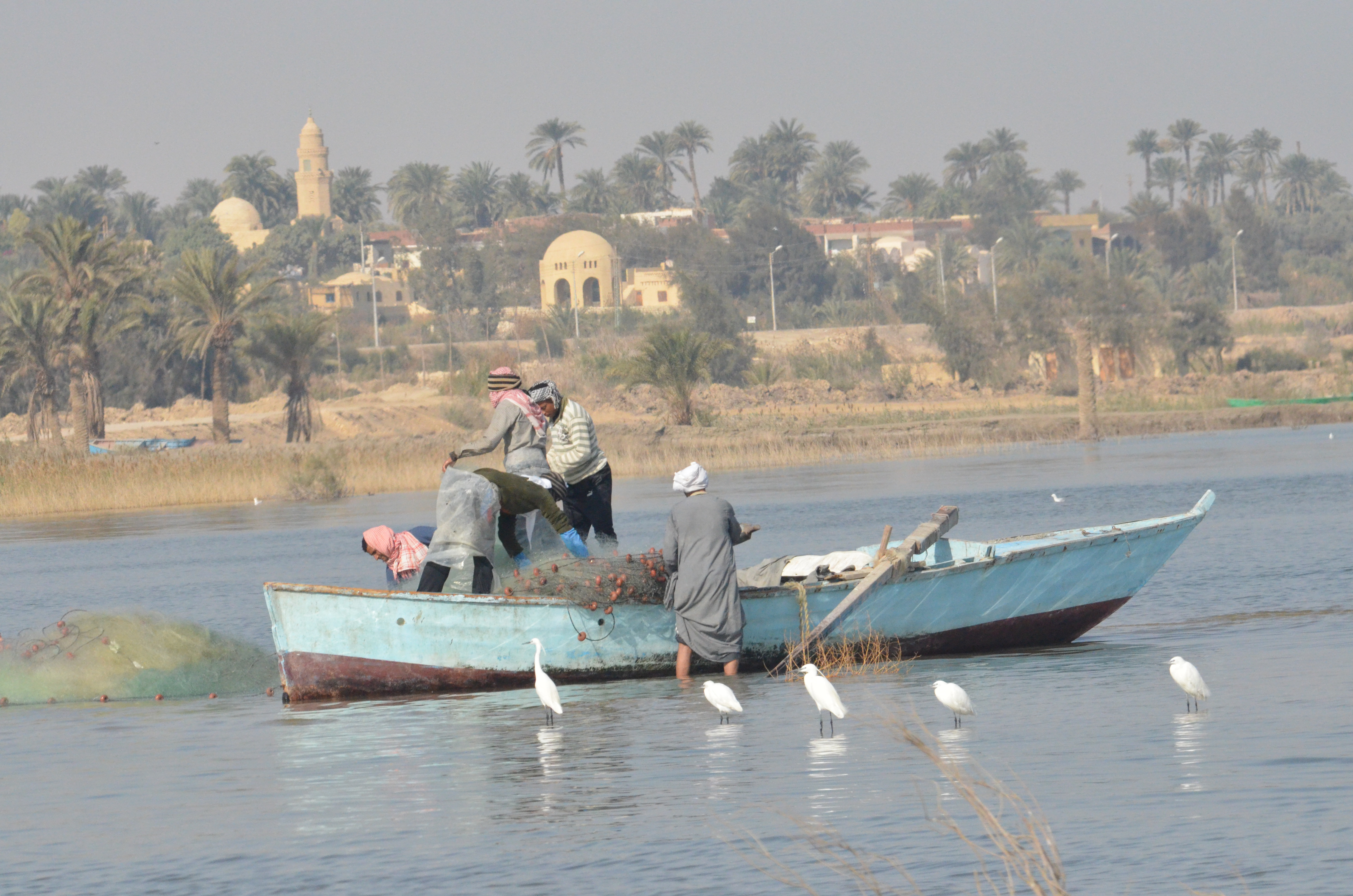 محمية قارون - قرية تونس- الفيوم